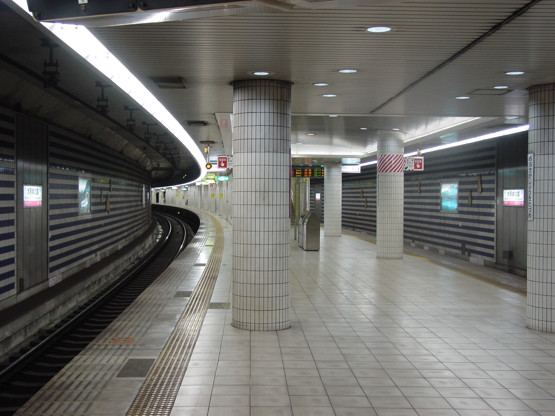 大阪城北詰駅プラットフォーム